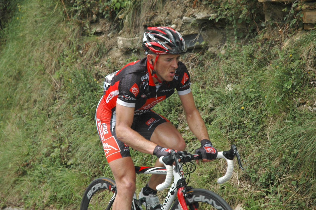 Constantino Zaballa (Euskal Bizikleta 2007)